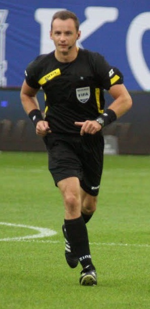 Paweł Raczkowski podczas meczu Ekstraklasy.